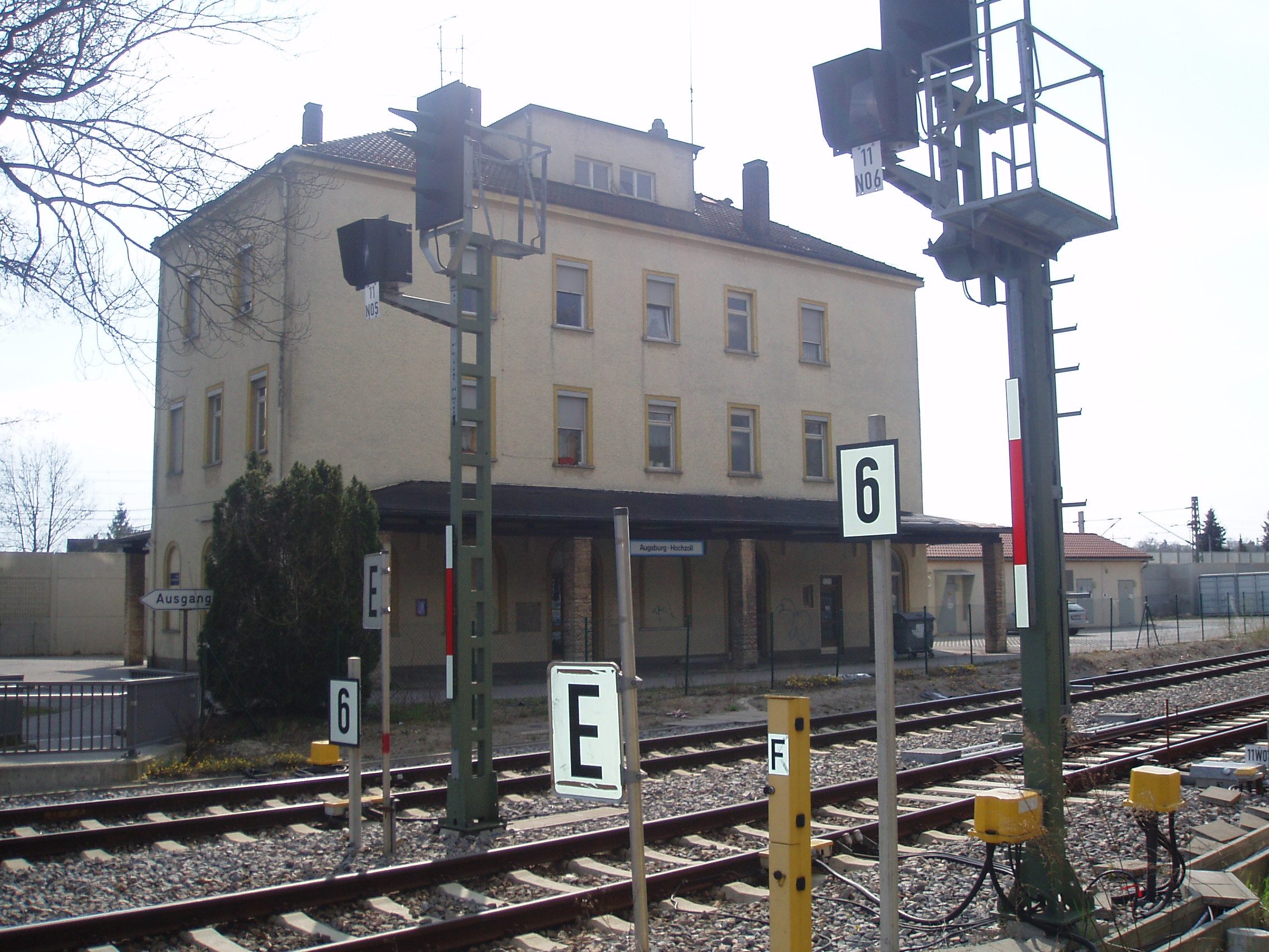 Bahnhof Augsburg-Hochzoll